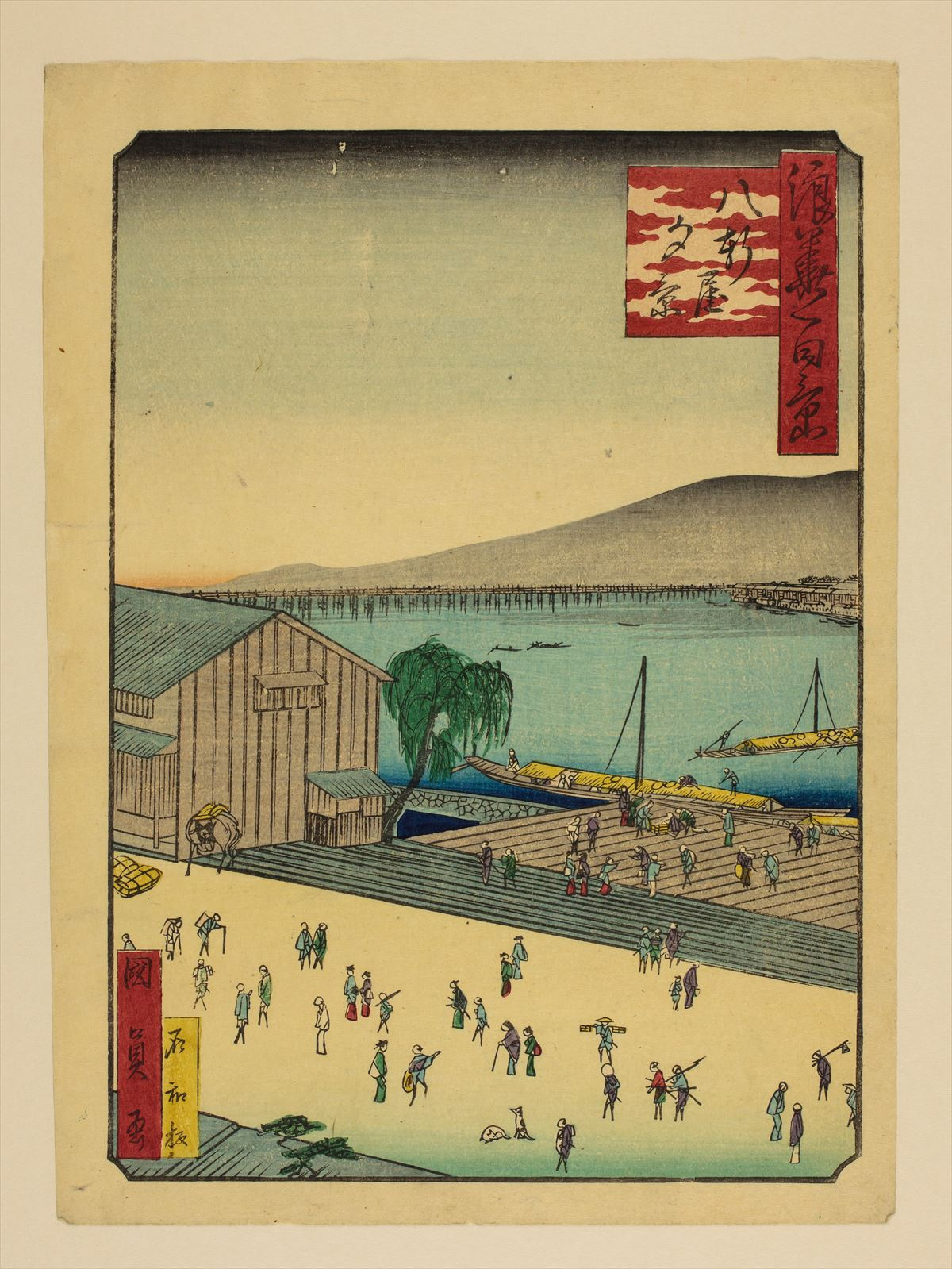 1800年代。歌川國員/画。浪花百景 102枚のうちの1枚。大阪市立中央図書館蔵。